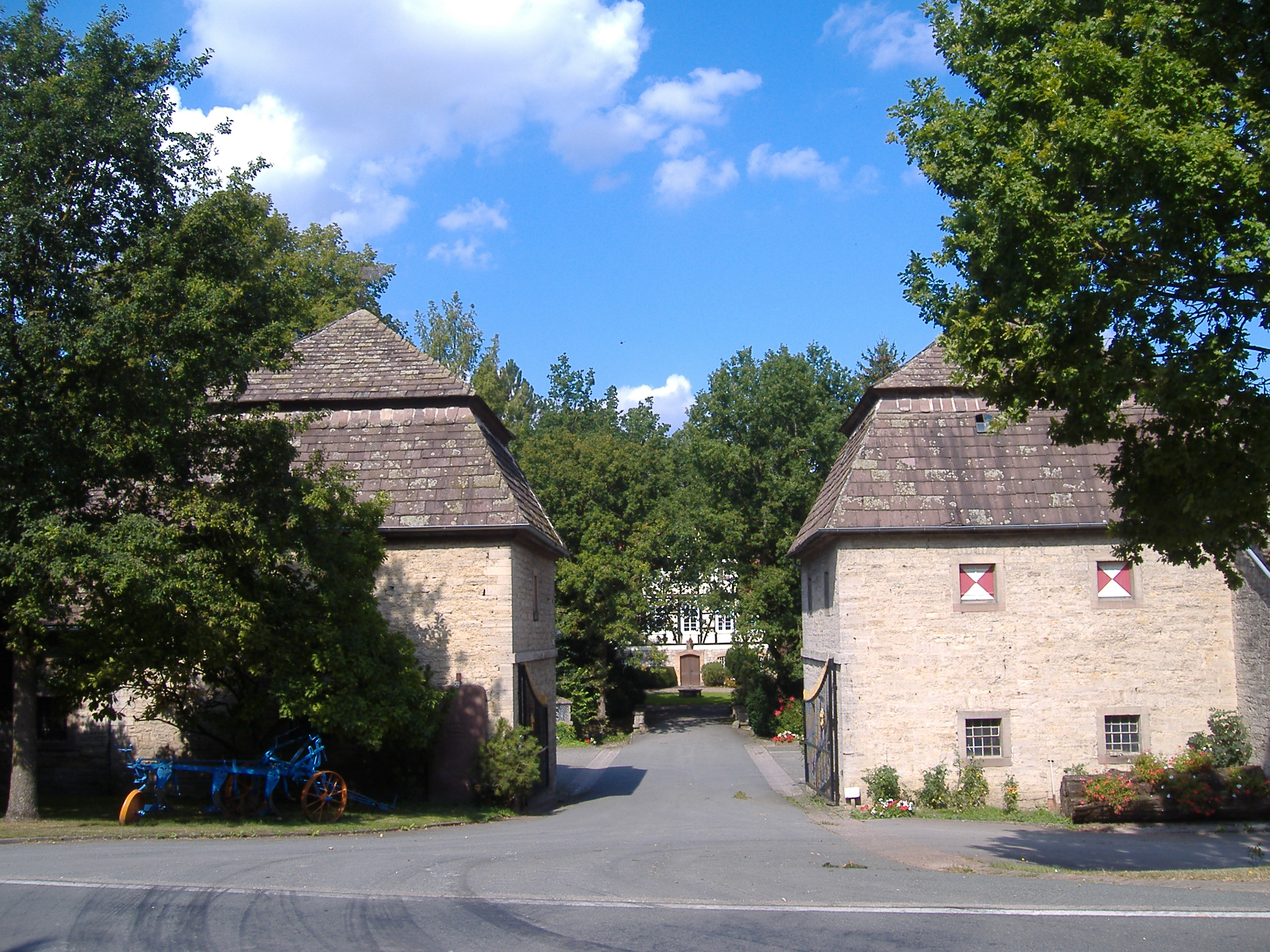 Baudenkmal, Liste der Baudenkmäler in Willebadessen Nr. 23